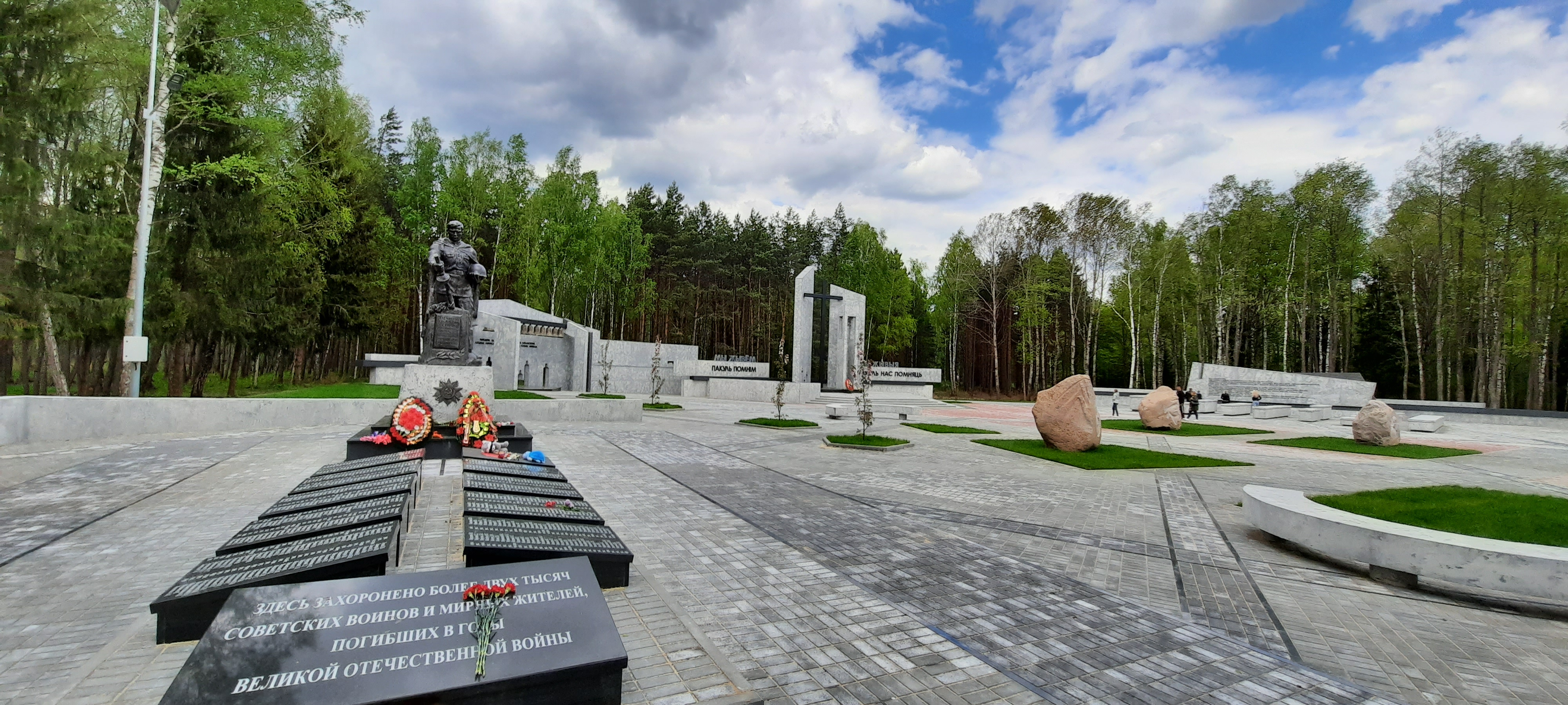 Мемарыяльны комплекс Ала ў мае 2020